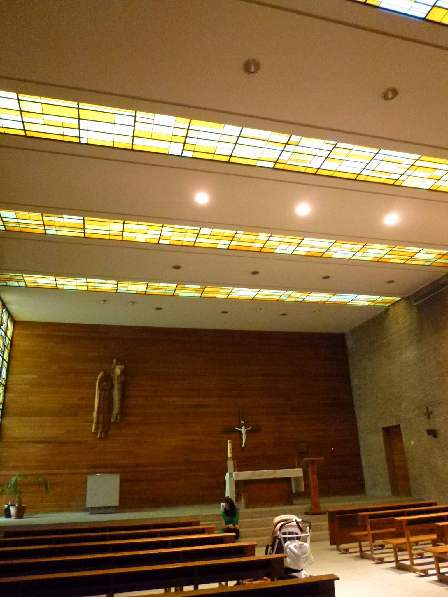 Iglesia de San Pedro Mártir (Dominicos), en Madrid